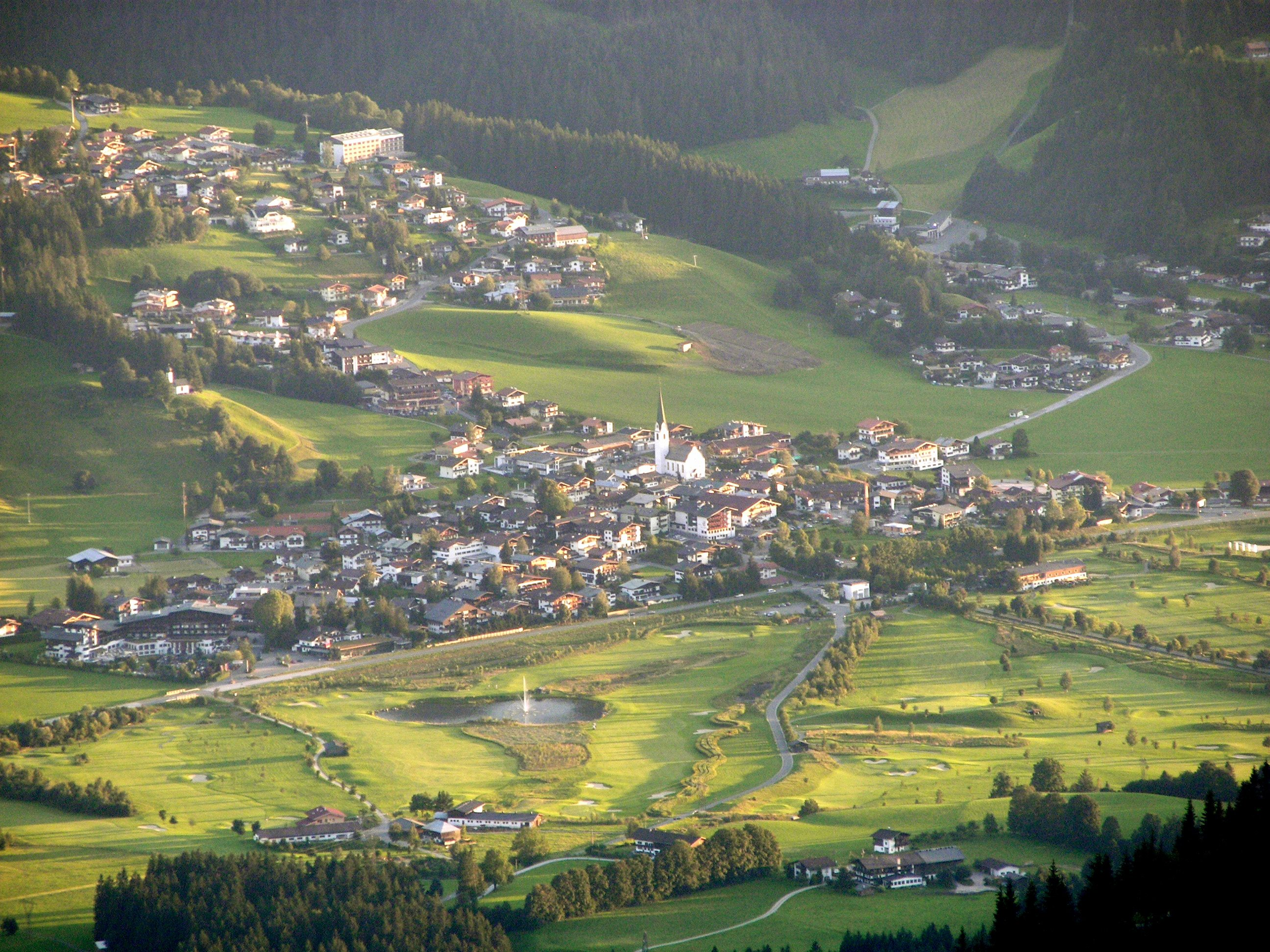 Blick auf Ellmau vom Hochgrubachkar (Wilder Kaiser)